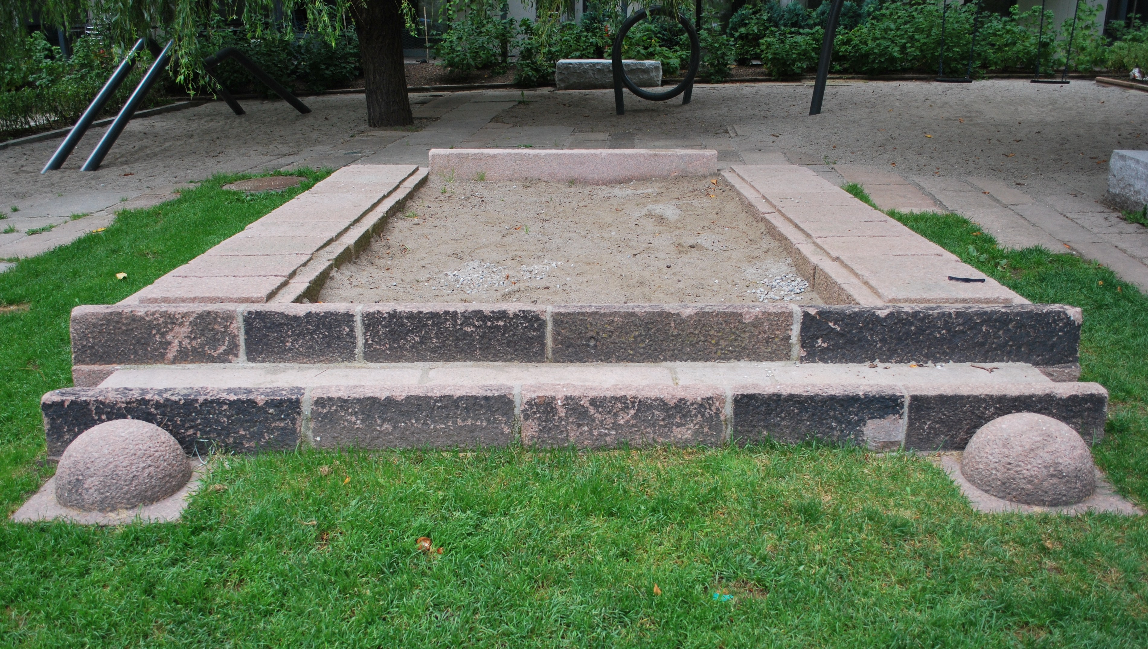 Sentralparken, Pilestredet park, Oslo. Granittportal fra gamle Rikshospitalet ble sandkasse.